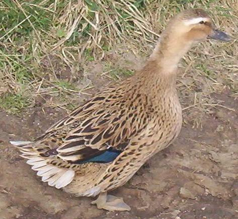 Cane de Rouen.